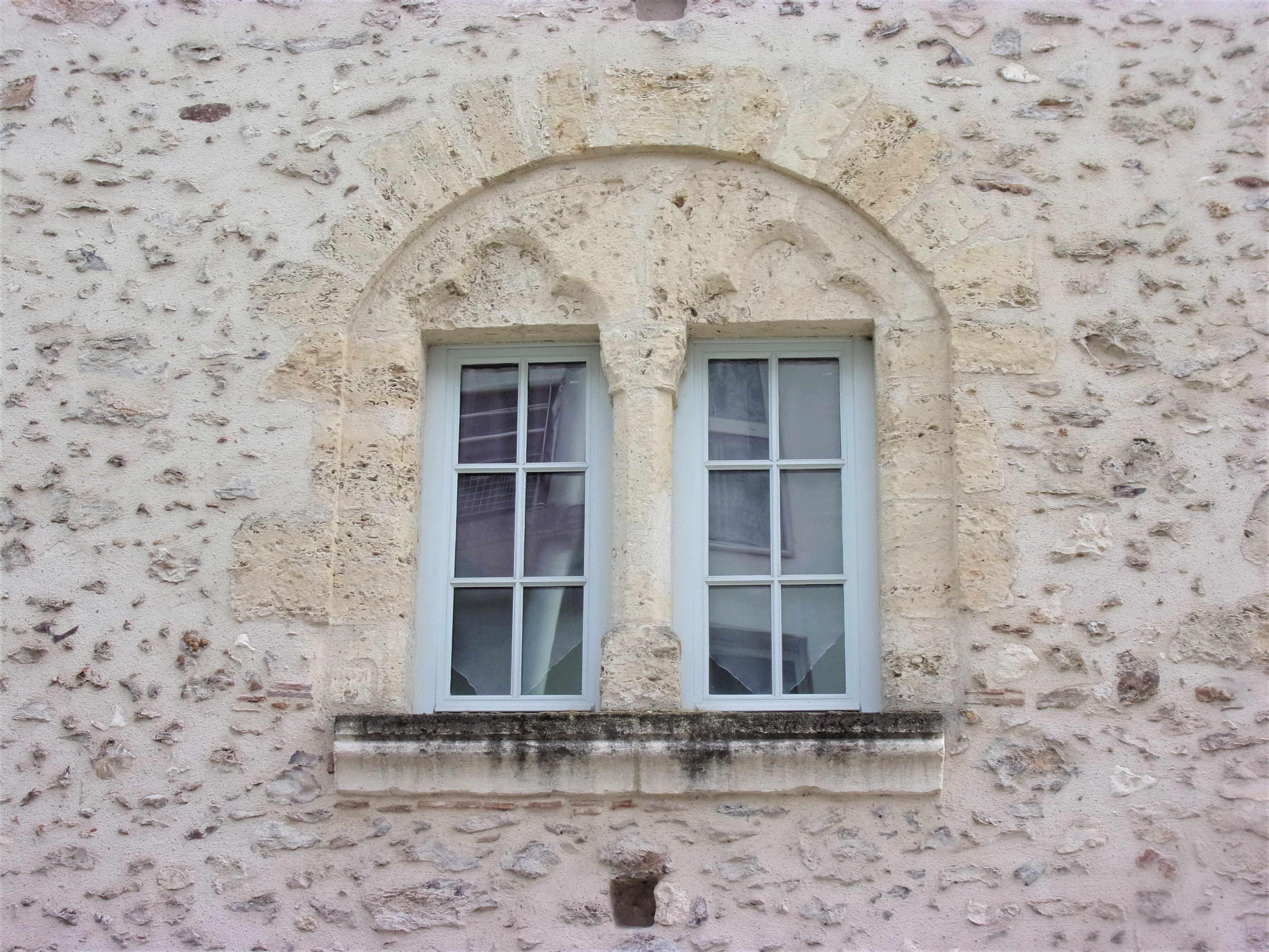 Maison Putsinus - détail de la fenêtre ouest